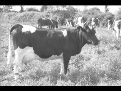 Photo de vache de race Bretonne Pie Noir. En noir et blanc.